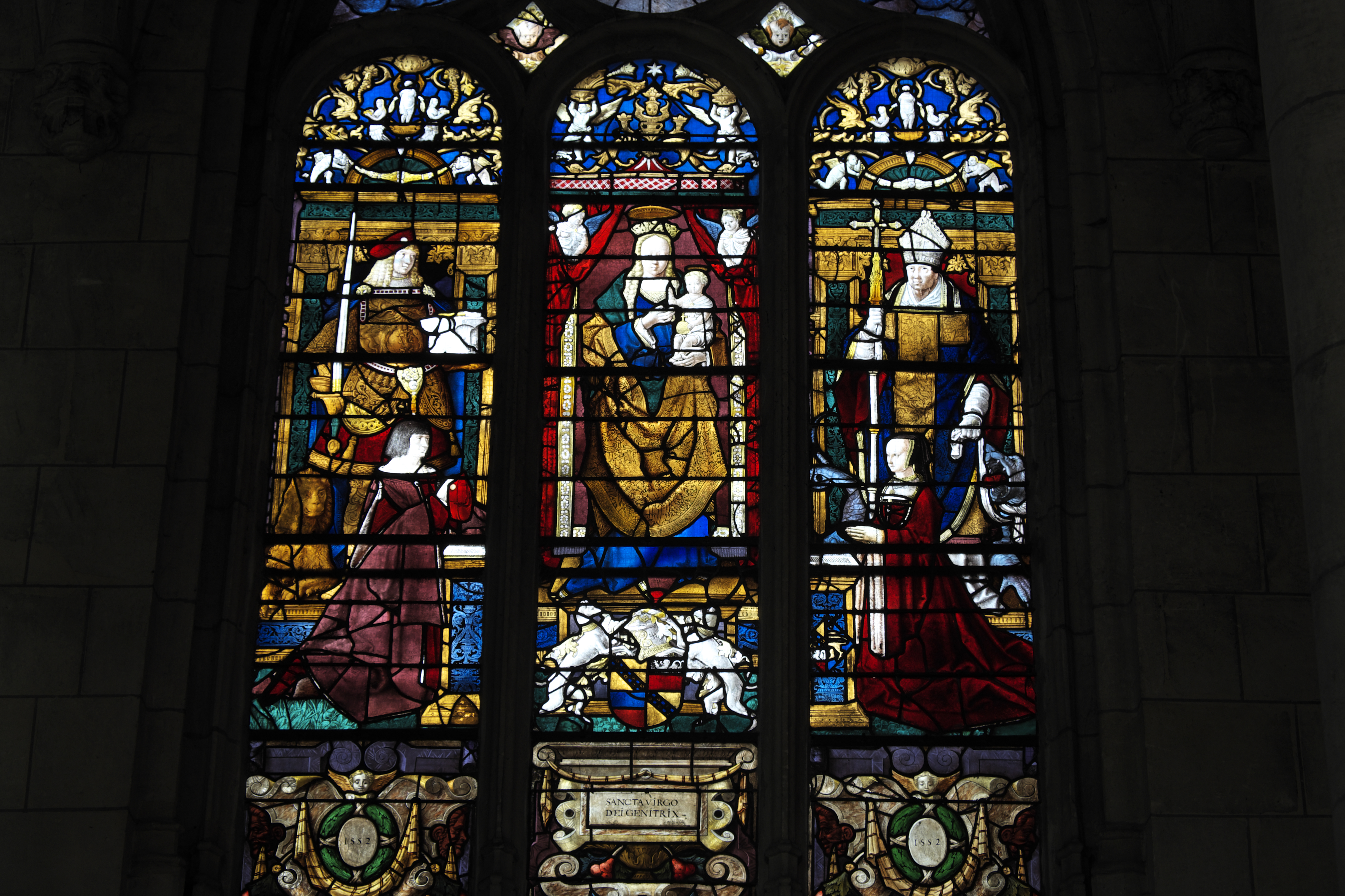 Katholische Kirche Sainte-Foy in Conches-en-Ouche im Département Eure (Haute-Normandie/Frankreich), Bleiglasfenster aus dem 16. Jahrhundert, mit der Jahreszahl 1552, Darstellung: Madonna mit Kind (Mitte), Saint Adrien (links), Saint Romain (rechts), Stifter (unten) (Ausschnitt)